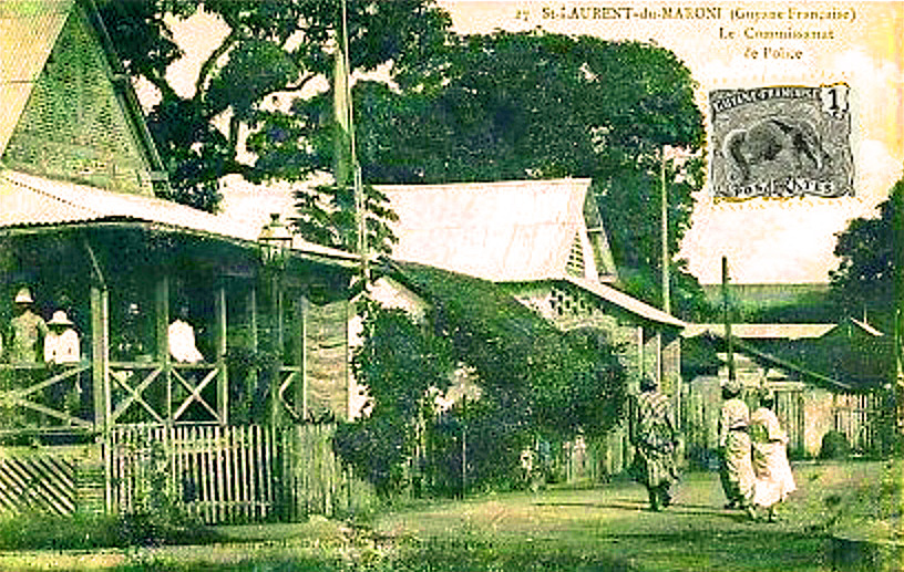 Commissariat de police à Saint-Laurent-de-Maroni